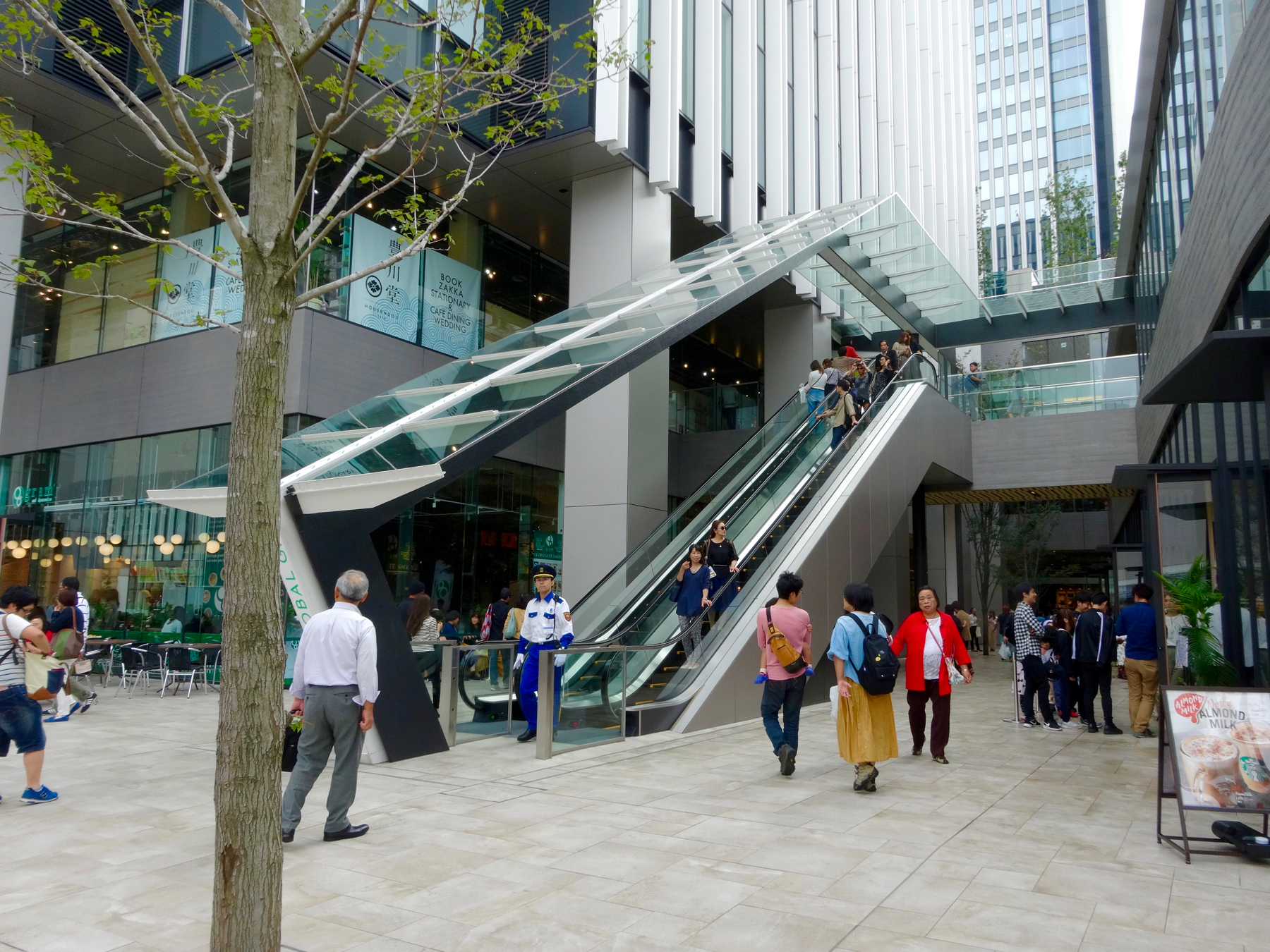 名古屋市の「ささしまライブ24」地区にあるグローバルゲートの商業施設。